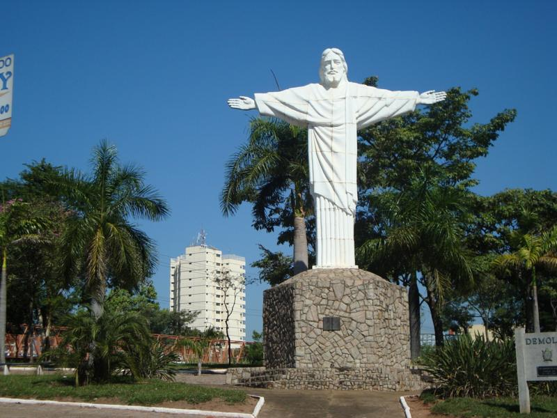 Entrada de Adamantina/SP